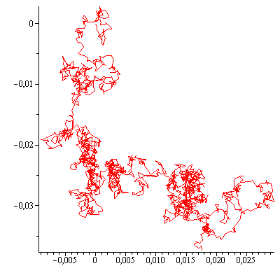 brownien 2 dimensions en 3000 points